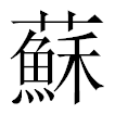 Су фамилия